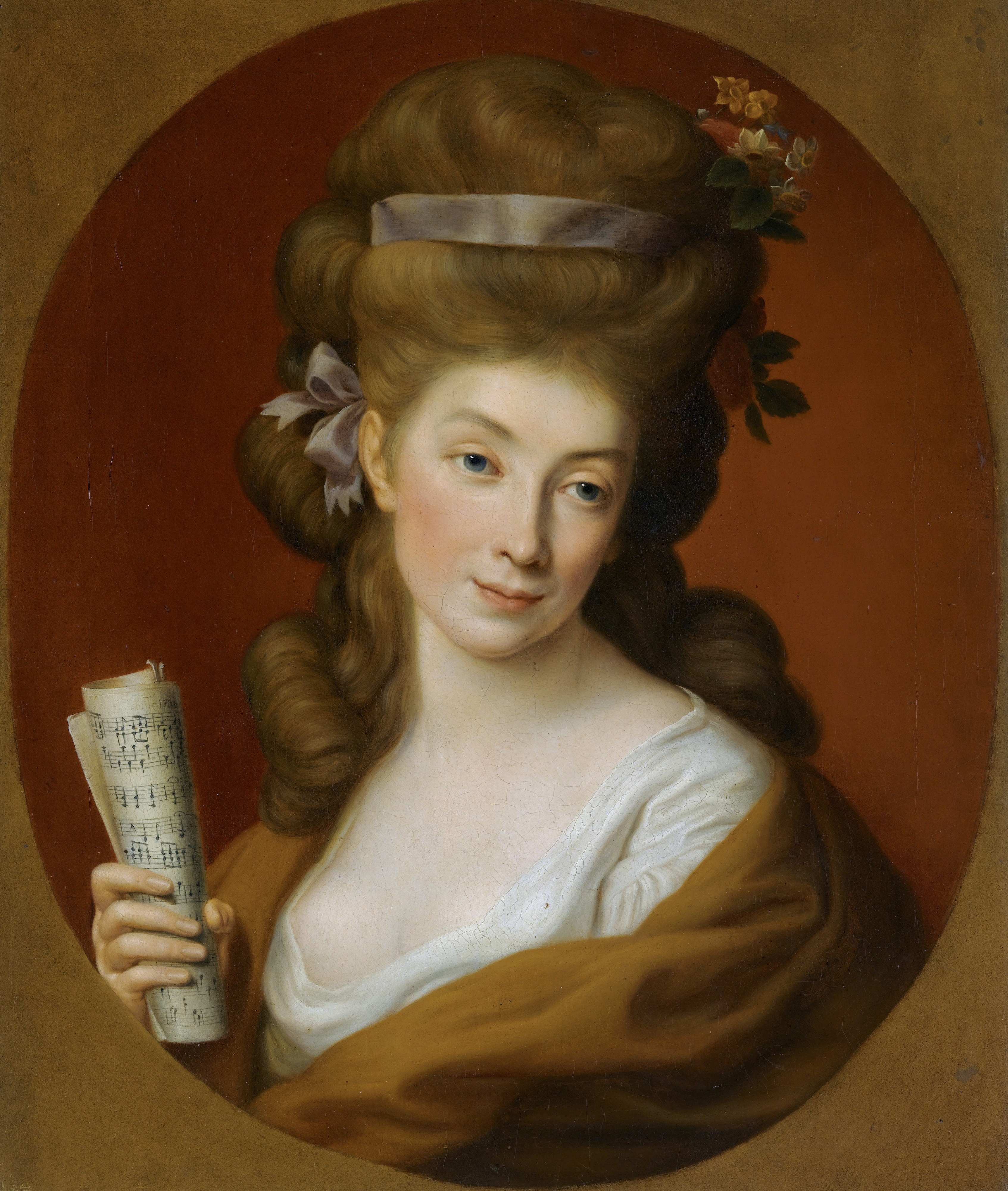 Izabela z Lubomirskich Potocka (1755-1783) jako Polihymnia